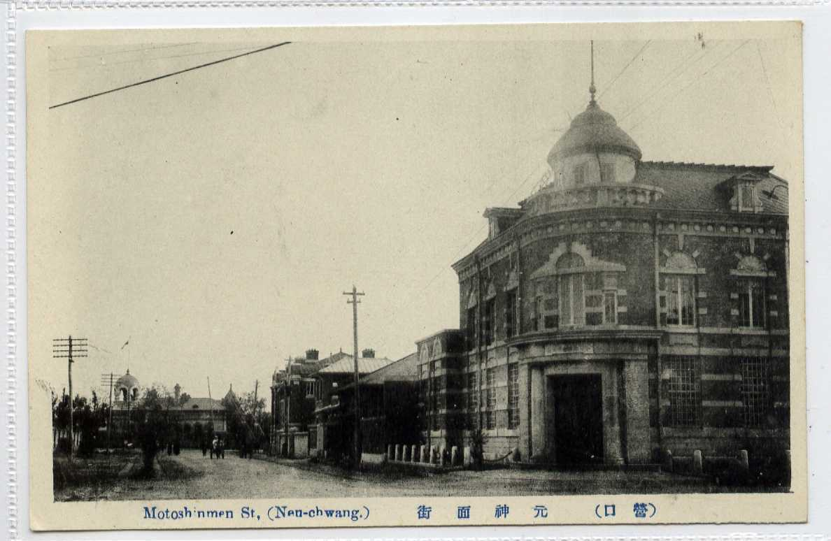 辽宁营口鼋神庙街